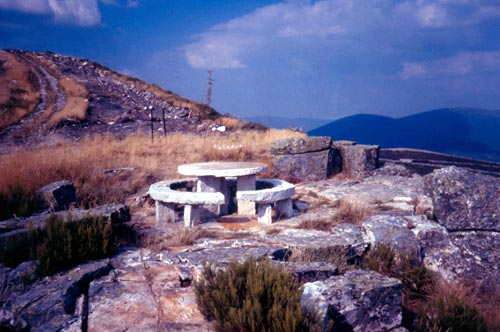 Pena dos cuatro cabaleiros